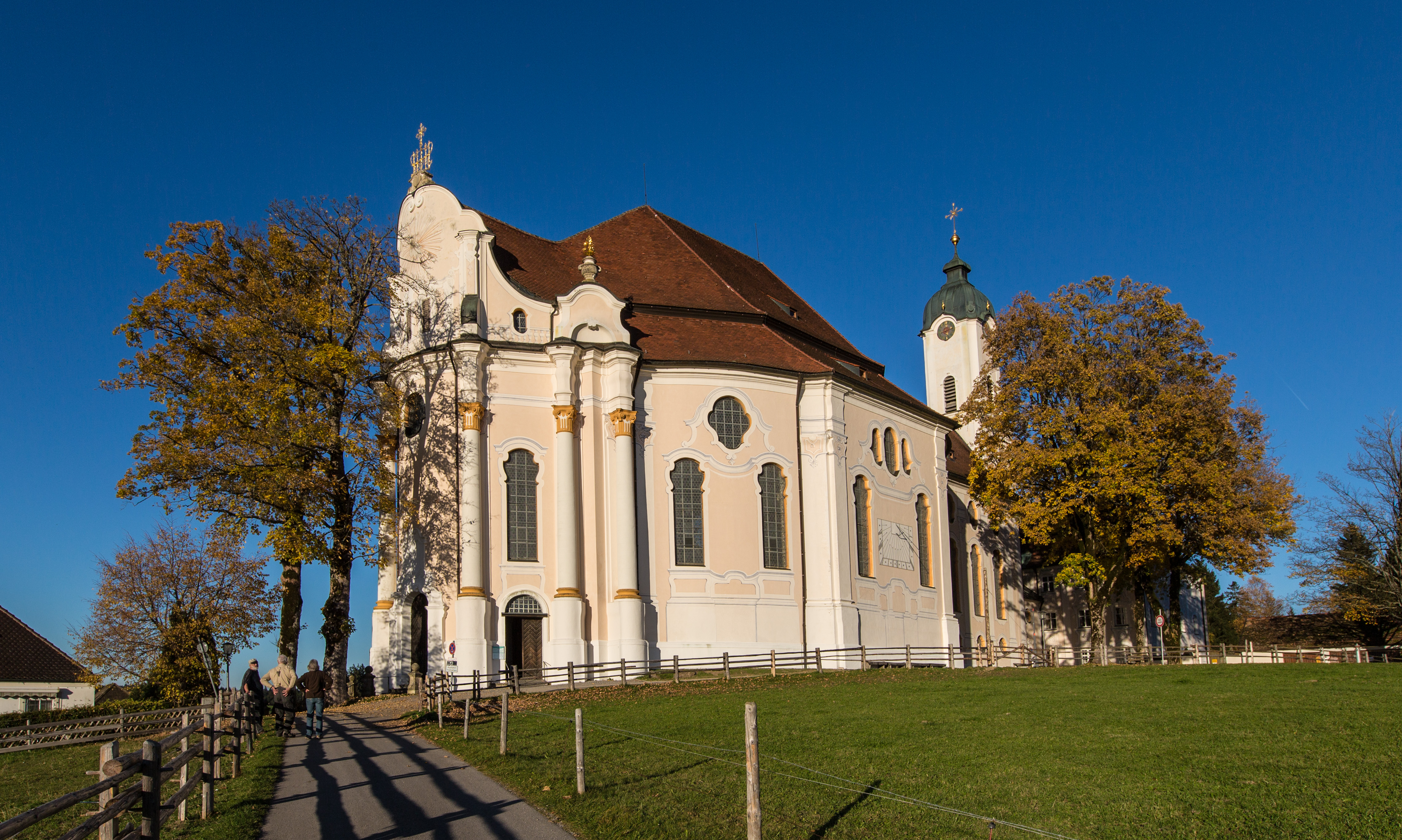 Wieskirche in der späten NachmitagssonneThis is a photograph of an architectural monument.